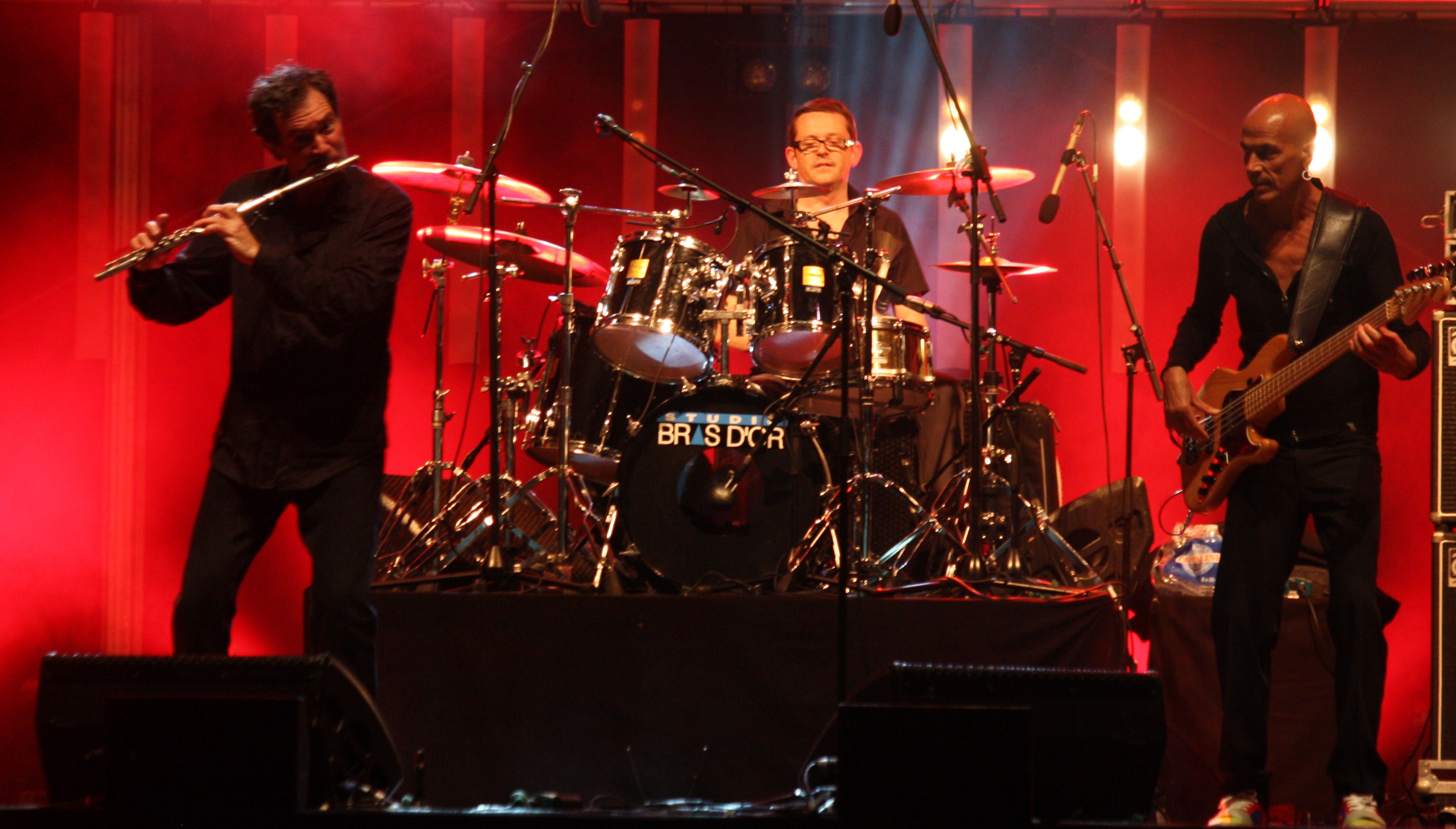 Le groupe Gwendal au festival Het Lindeboom à Loon-Plage (près de Dunkerque) en juillet 2009.